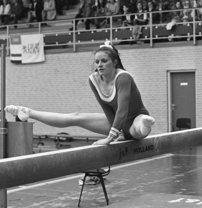 Ans van Gerwen at national championships